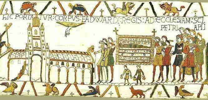 HIC PORTATVR CORPVS EADWARDI REGIS AD ECCLESIAM S[AN]C[T]I PETRI AP[OSTO]LI